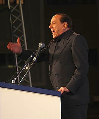 Silvio Berlusconi